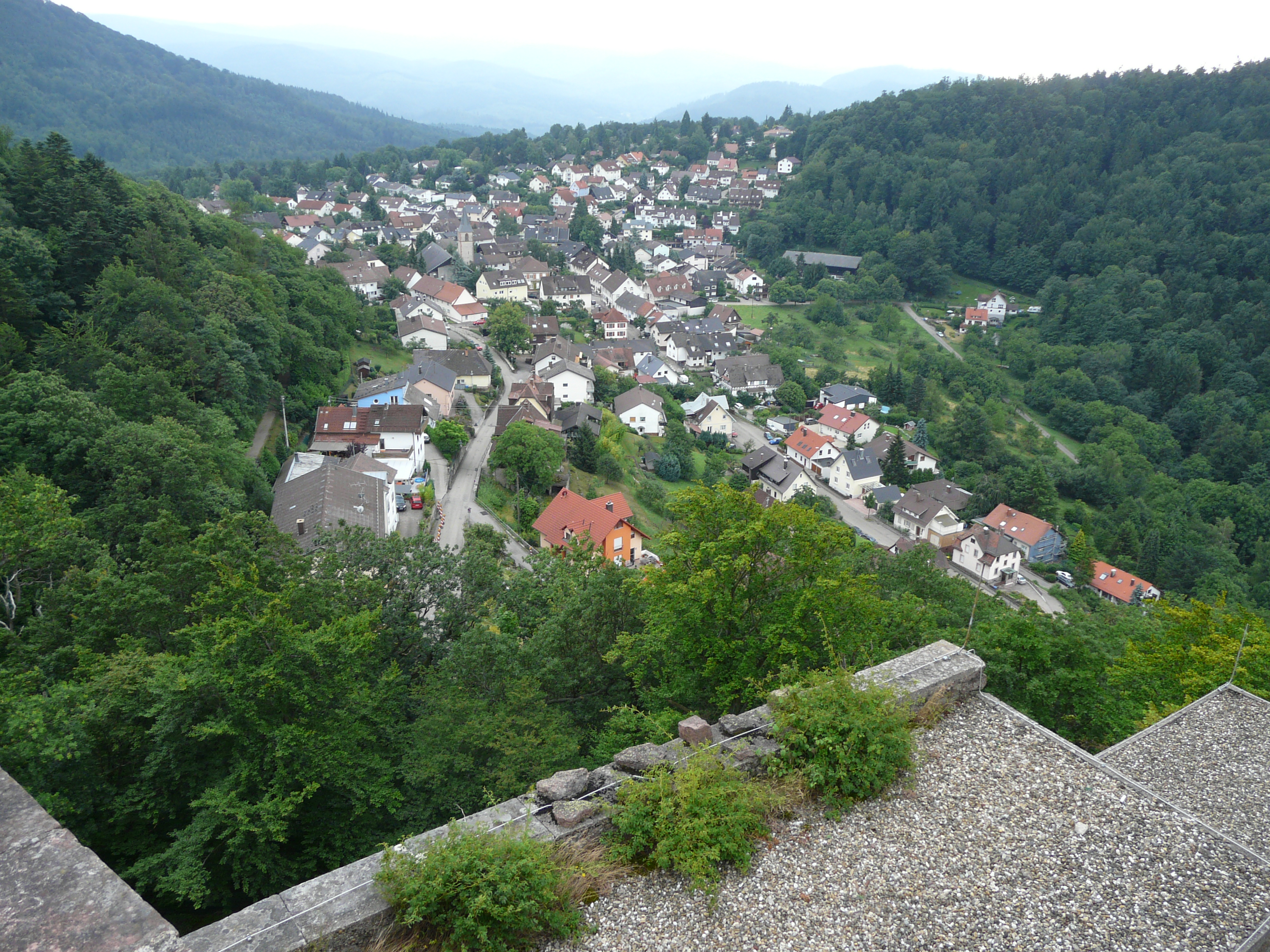 Bildinhalt: Blick von oben auf Ebersteinburg Aufnahmeort: Ebersteinburg, Deutschland